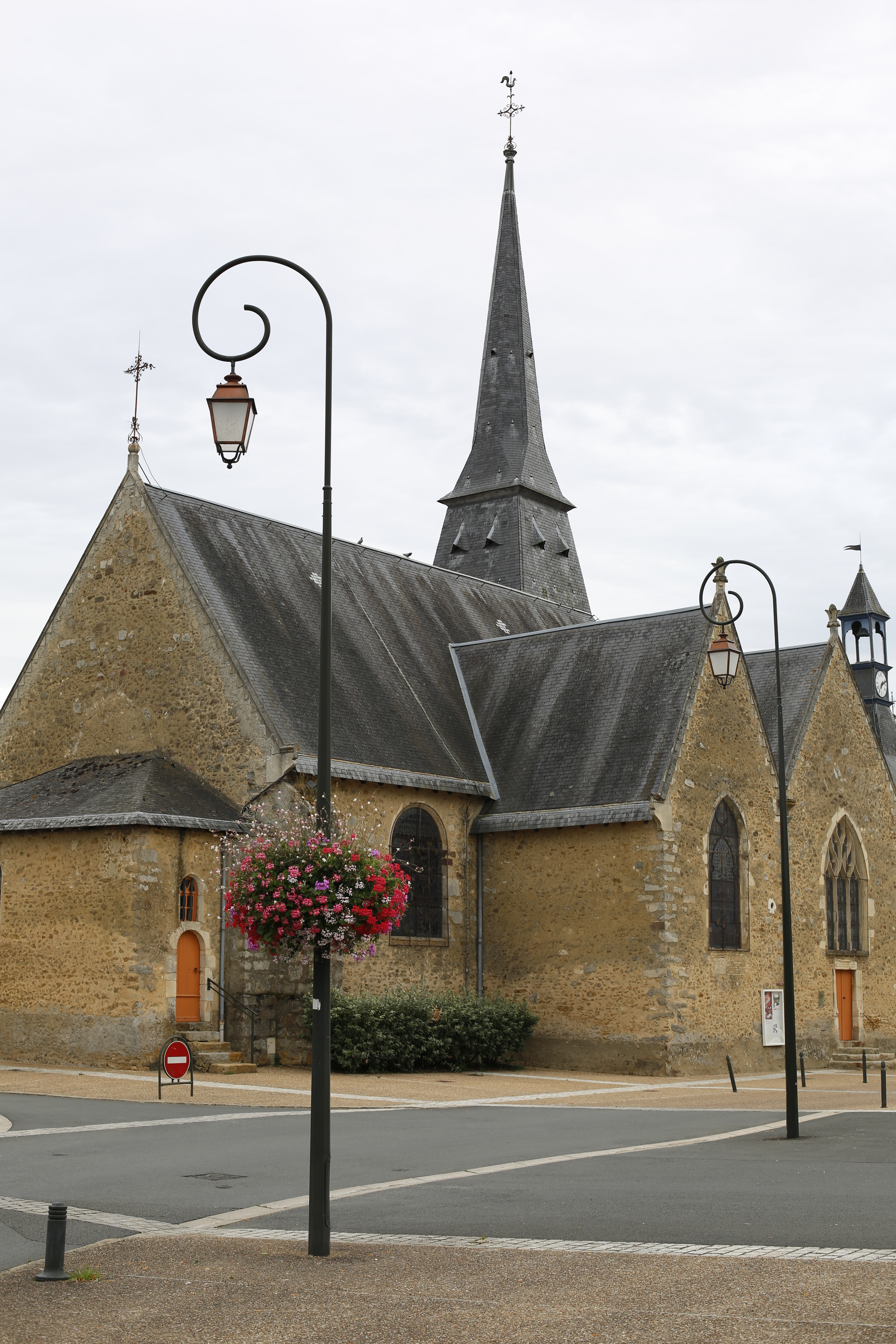 Église Saint-Germain de Savigné-l'Évêque.